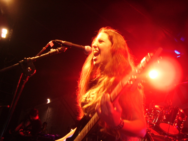 Claudia Maúrtua de NvNv en vivo